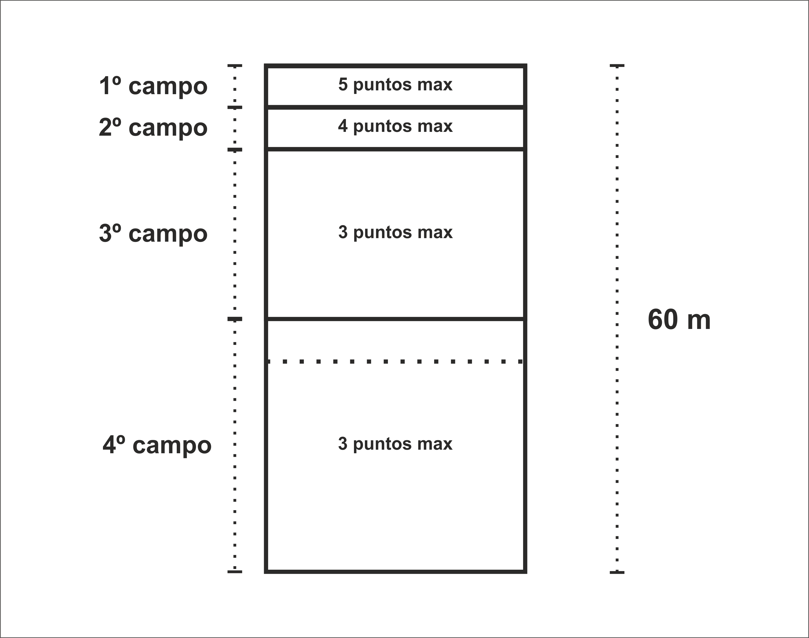 Descripción de los campos con puntaje